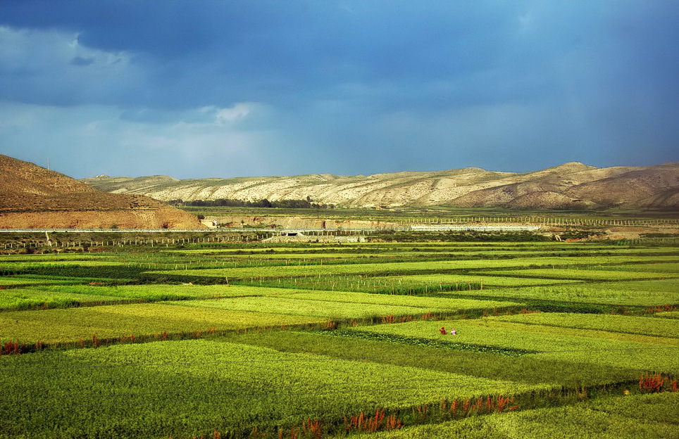 甘肃 荒山与沃土